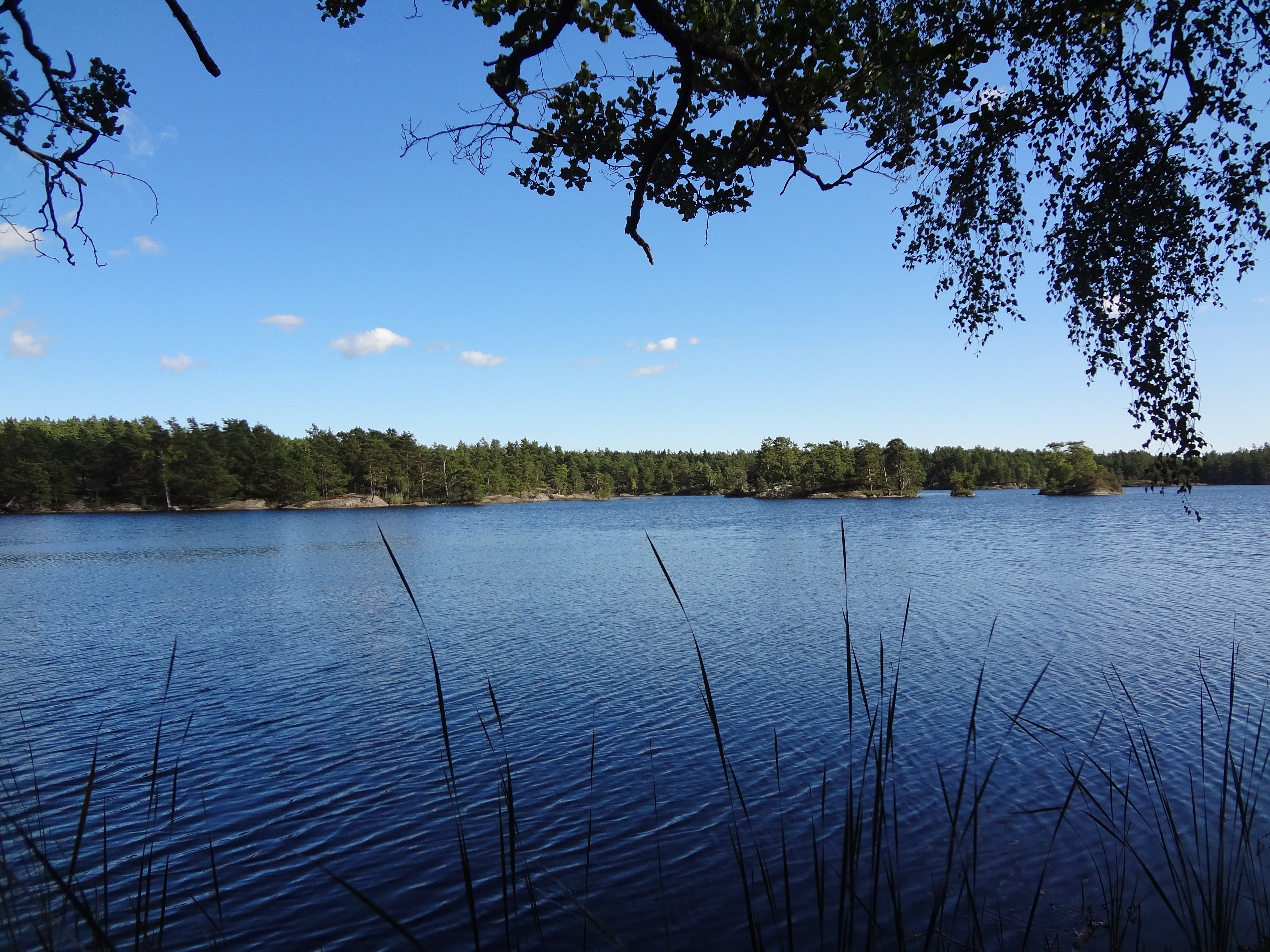 Sjön Nybysjön på Ornö.